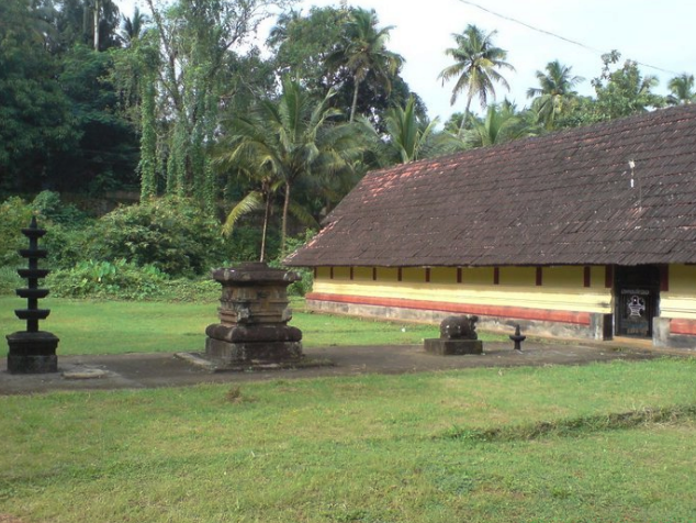 കിഴക്കേനട-നെടുമ്പുര ശിവക്ഷേത്രം